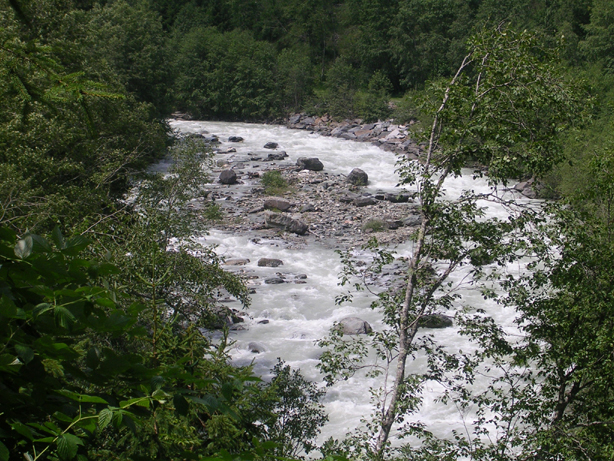 River Isel near Mitteldorf (Virgen)